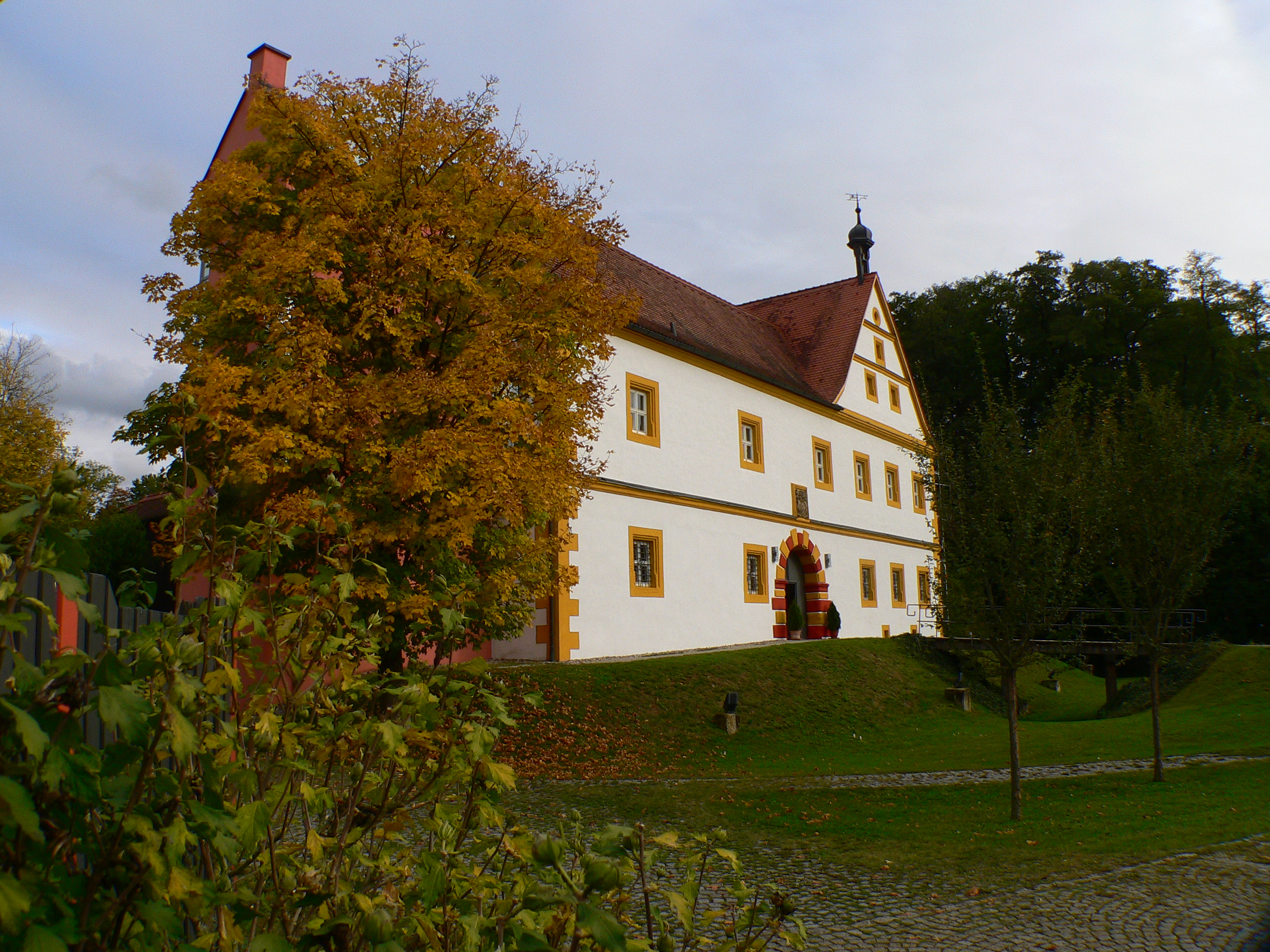 Schloss Wernsdorf in Strullendorf, Bayern, Regierungsbezirk Oberfranken, Landkreis Bamberg